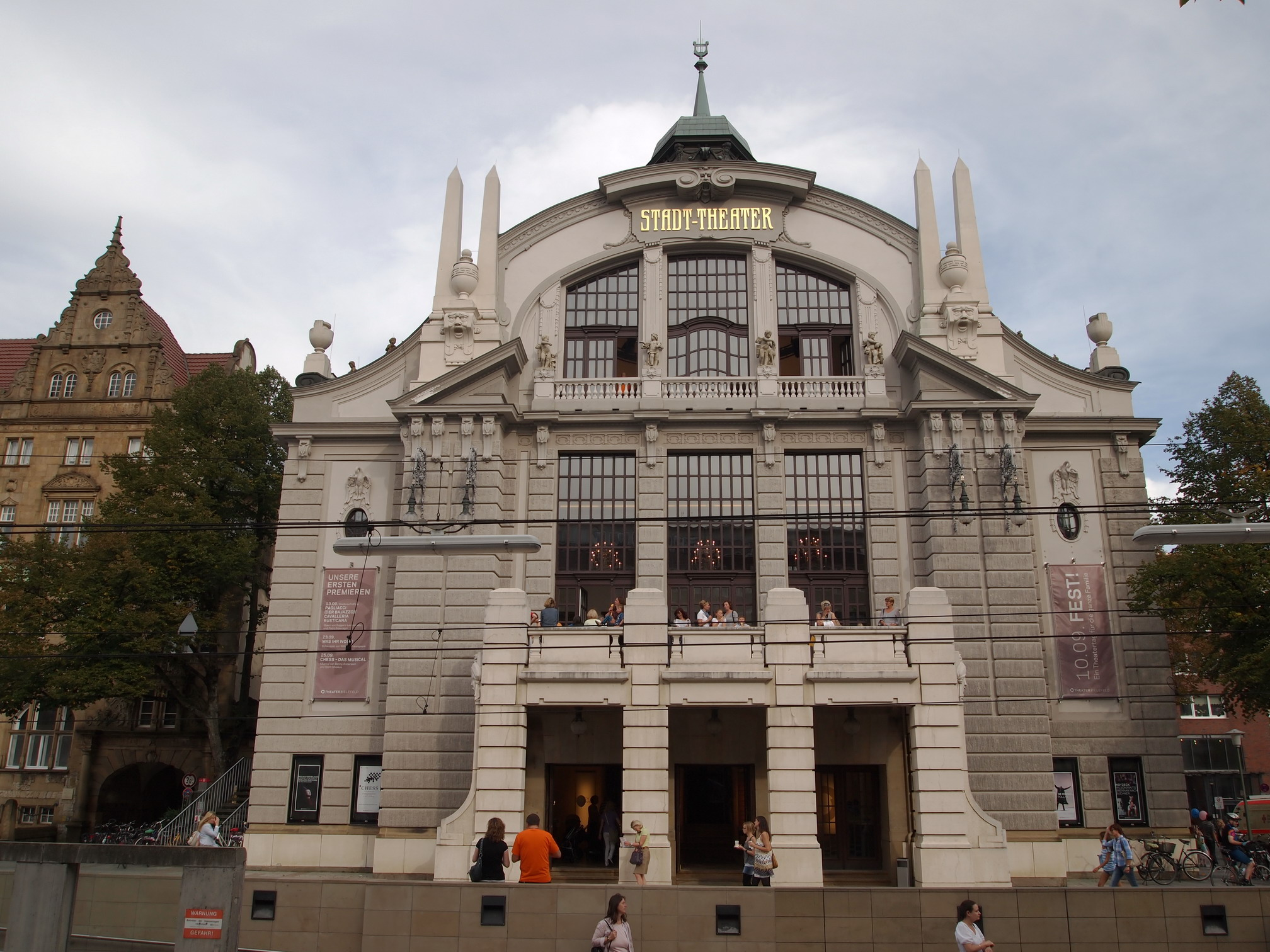 Stadt-Theater Bielefeld, links ist noch ein Teil des Alten Rathauses erkennbar.